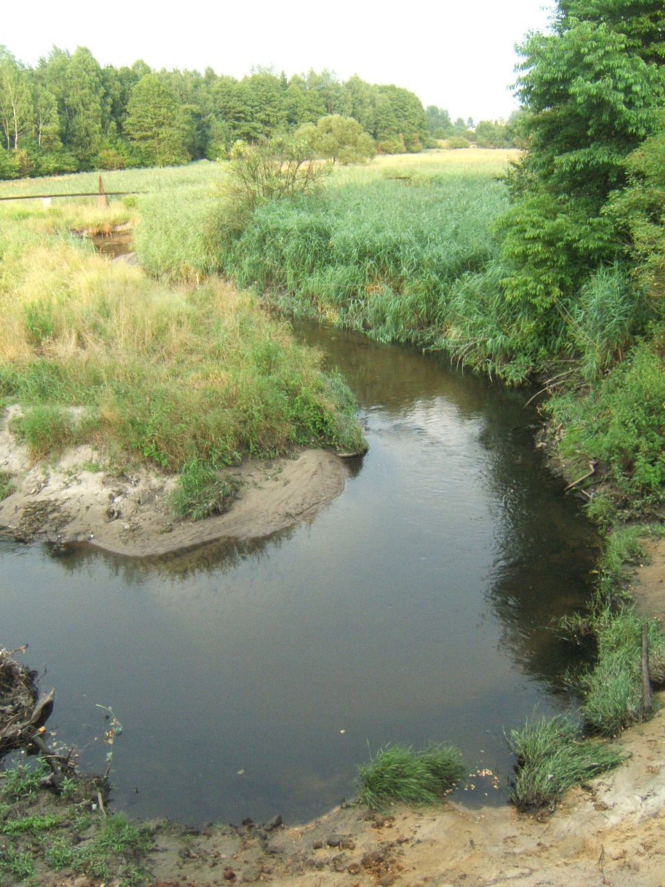 Meander rzeki Kłodnicy między Kochłowicami a Panewnikami